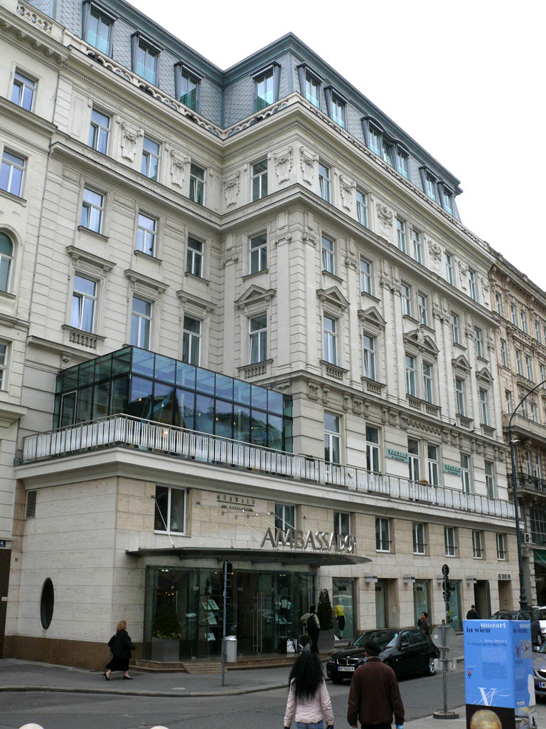 Mehlgrube